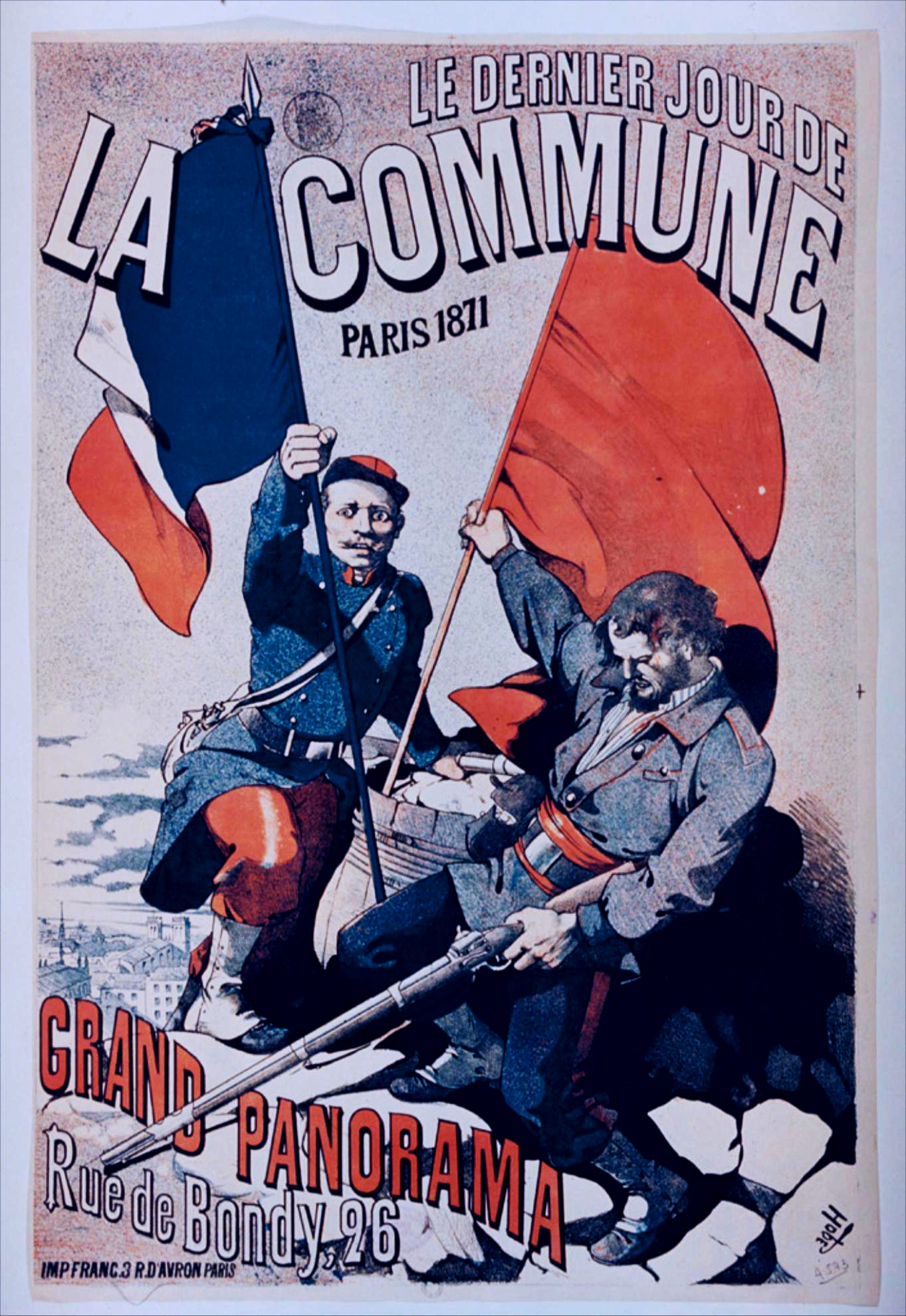 Le Dernier Jour de la Commune, Paris 1871. Lithogr. en coul. 61 x 40 cm.